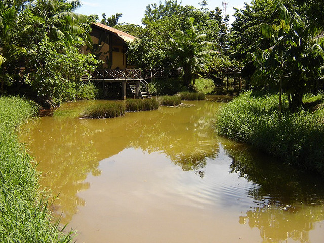 Museu Sacacá, em Macapá, Amapá, Brasil. Foto de Marcus Paulo tirada em 30 de dezembro de 2005.